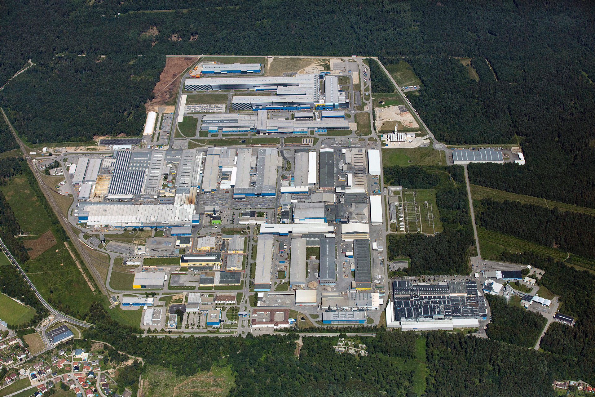 AMAG Ranshofen mit dem neuen Warm- und Kaltwalzwerk.